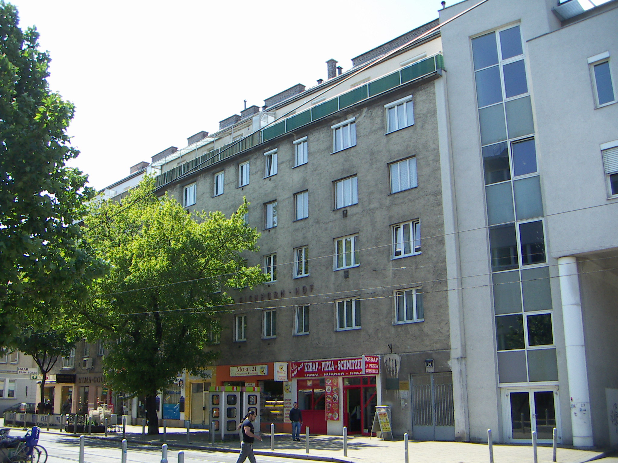 Rudolf-Franz-Eichhorn-Hof, Schloßhofer Straße 26, nach Rudolf Franz Eichhorn